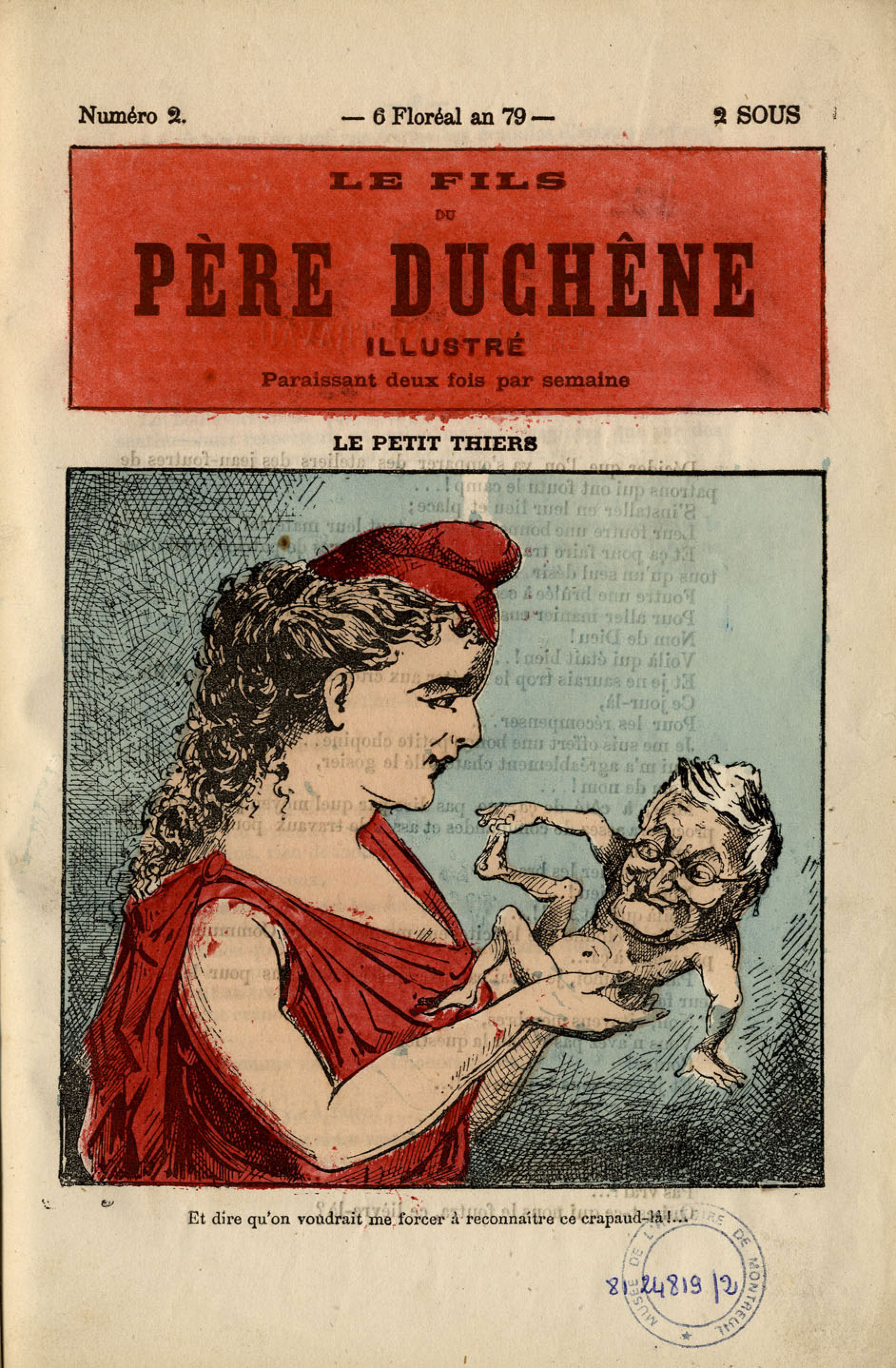 Couverture du Père Duchêne Illustré n°2 : le petit Thiers.